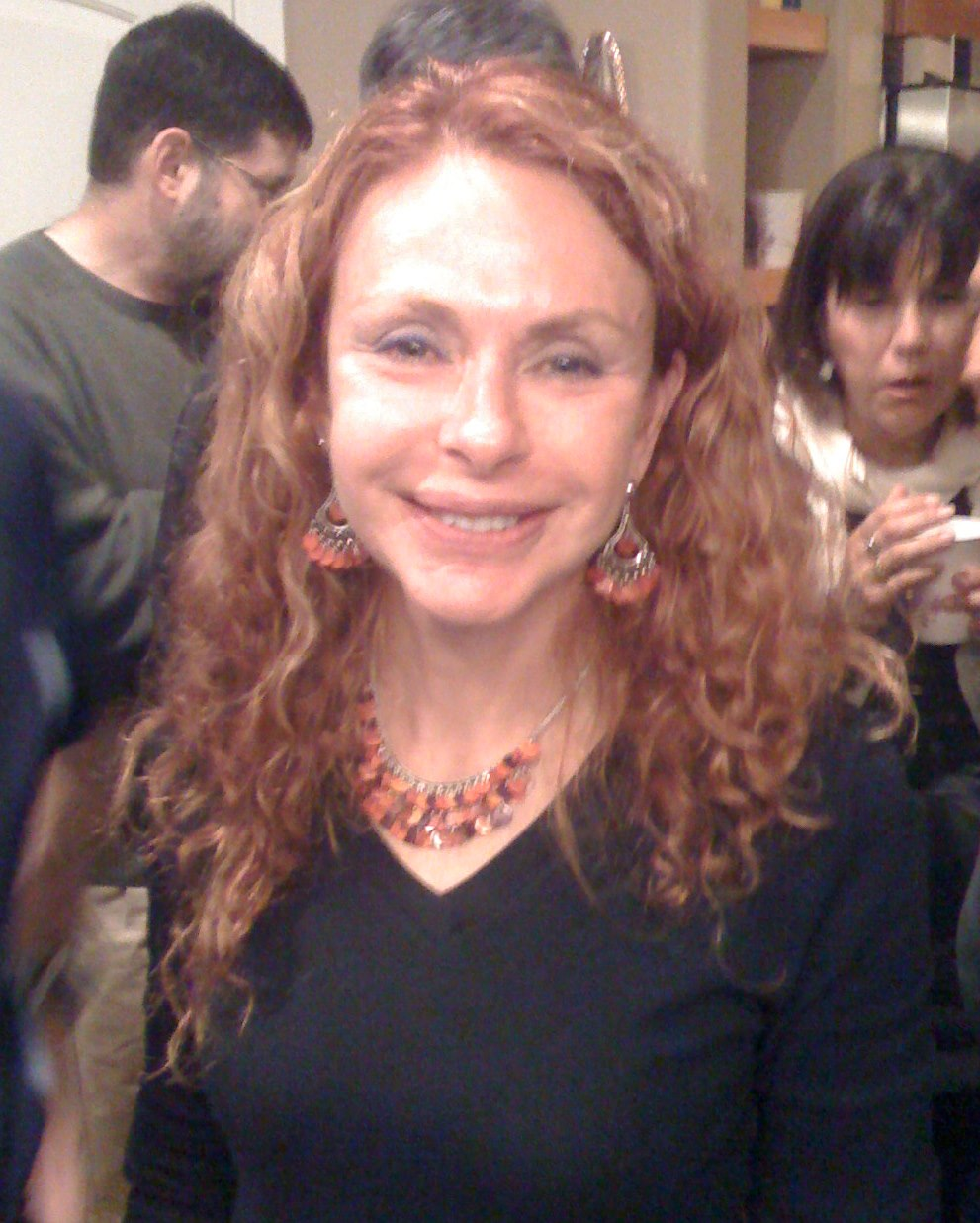 אליאנה קארפ טולדו